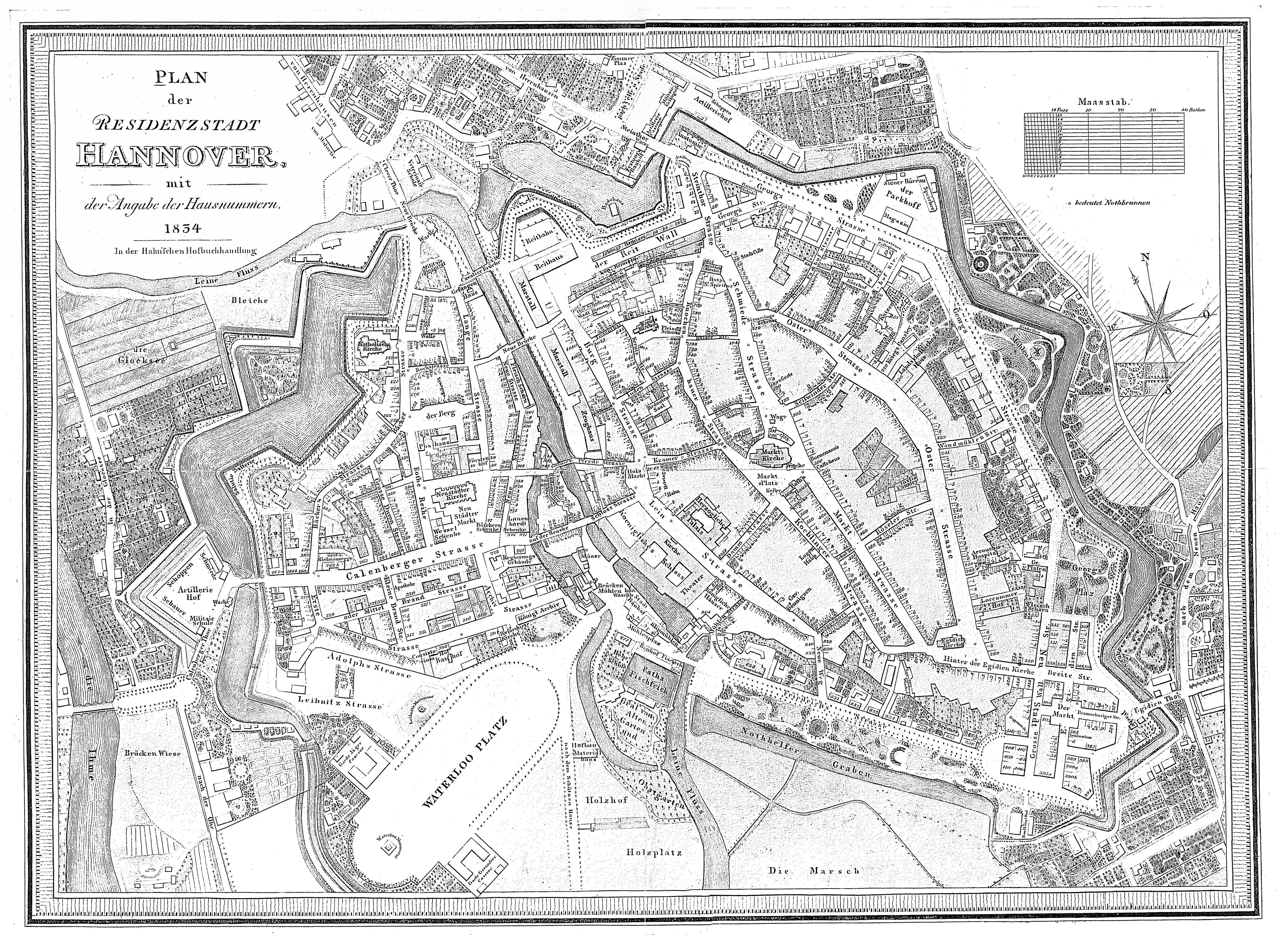 Plan der Residenzstadt Hannover mit Angabe der Hausnummern, 1834, in der Hahn'schen Hofbuchhandlung (schlecht zusammengesetzter Scan einer einfachen Kopie)